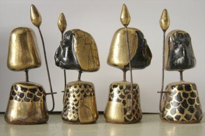 Pièces de jeu d'échec en céramique, Accolay, XXe siècle, France